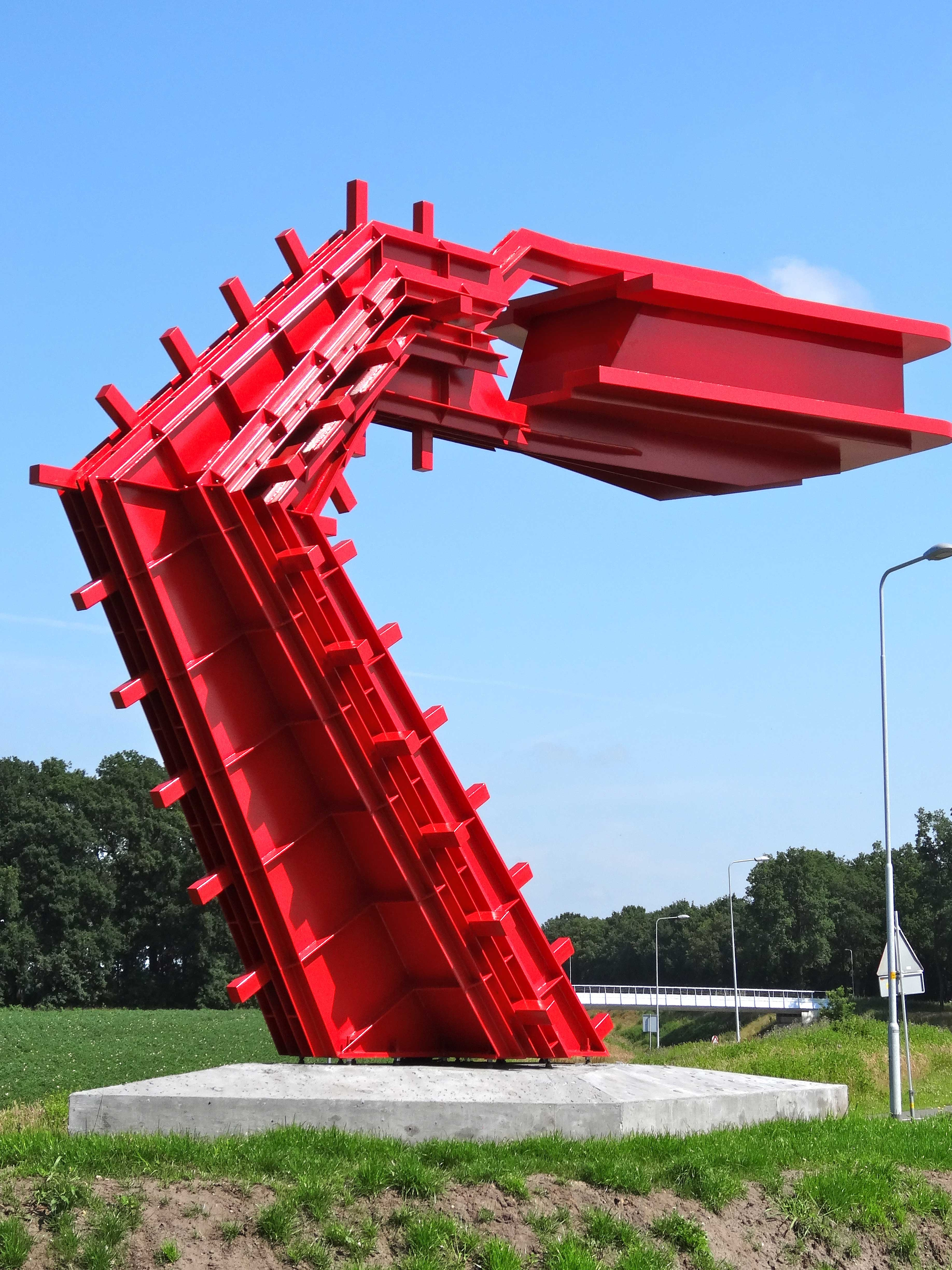 kunstwerk bij de brandweerkazerne nabij Borger ontworpen door Frank Havermans